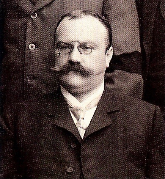 Hermann_Haußer (Ausschnitt aus einem Foto des Gemeinderats)